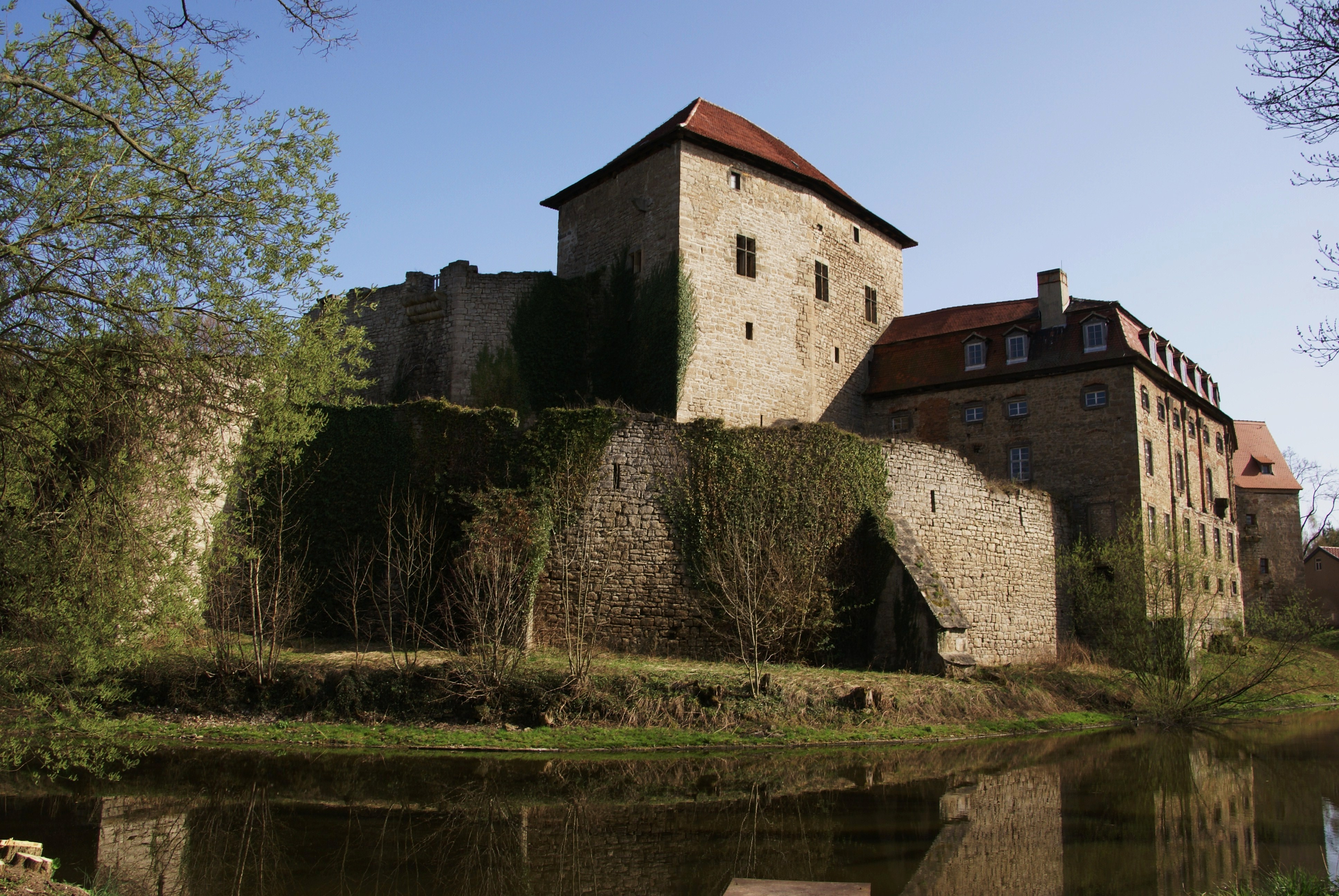 Wasserburg Kapellendorf (Nordwestseite) - Kapellendorf, Weimarer Land, Thüringen, Deutschland